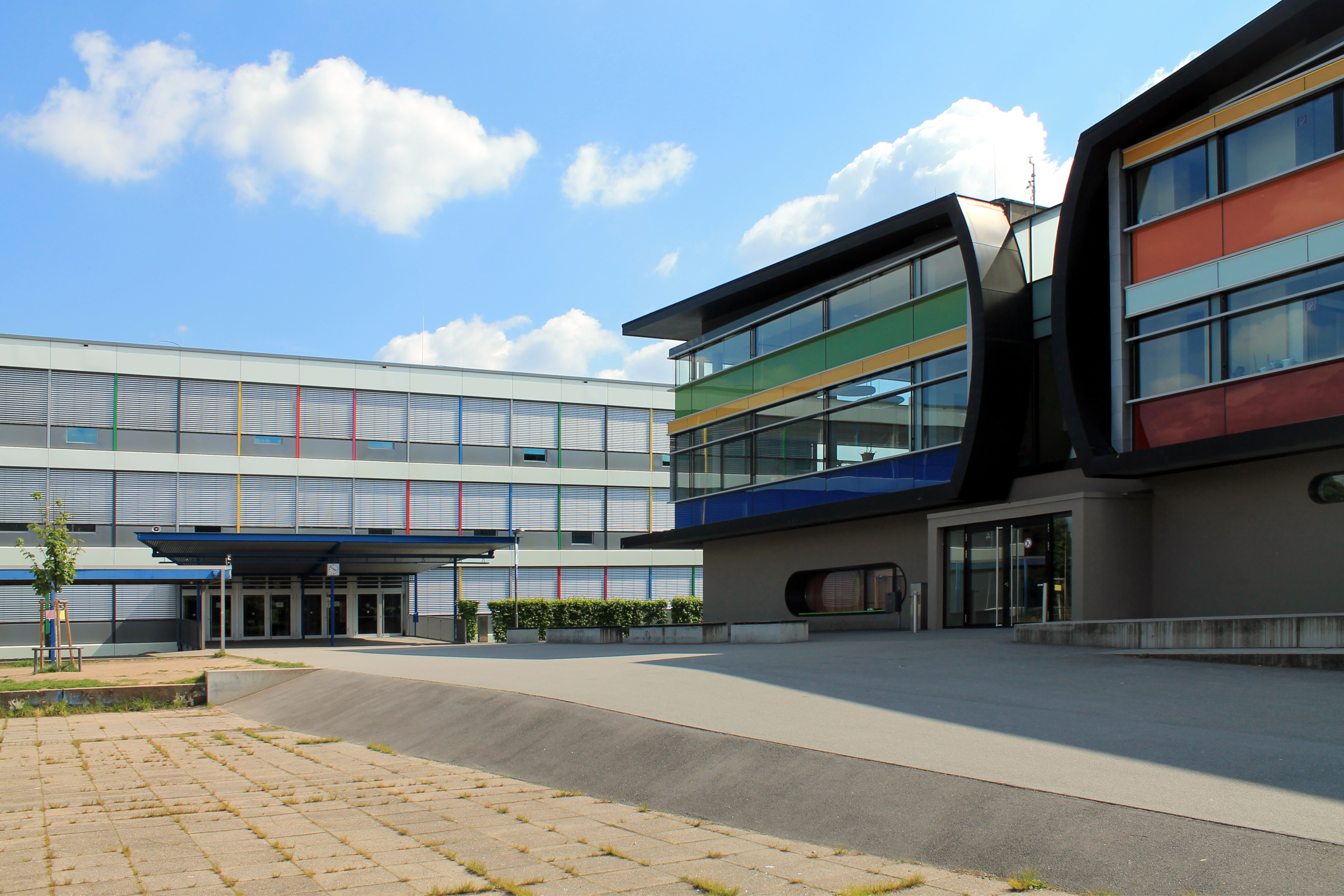 Hebel-Gymnasium Schwetzingen